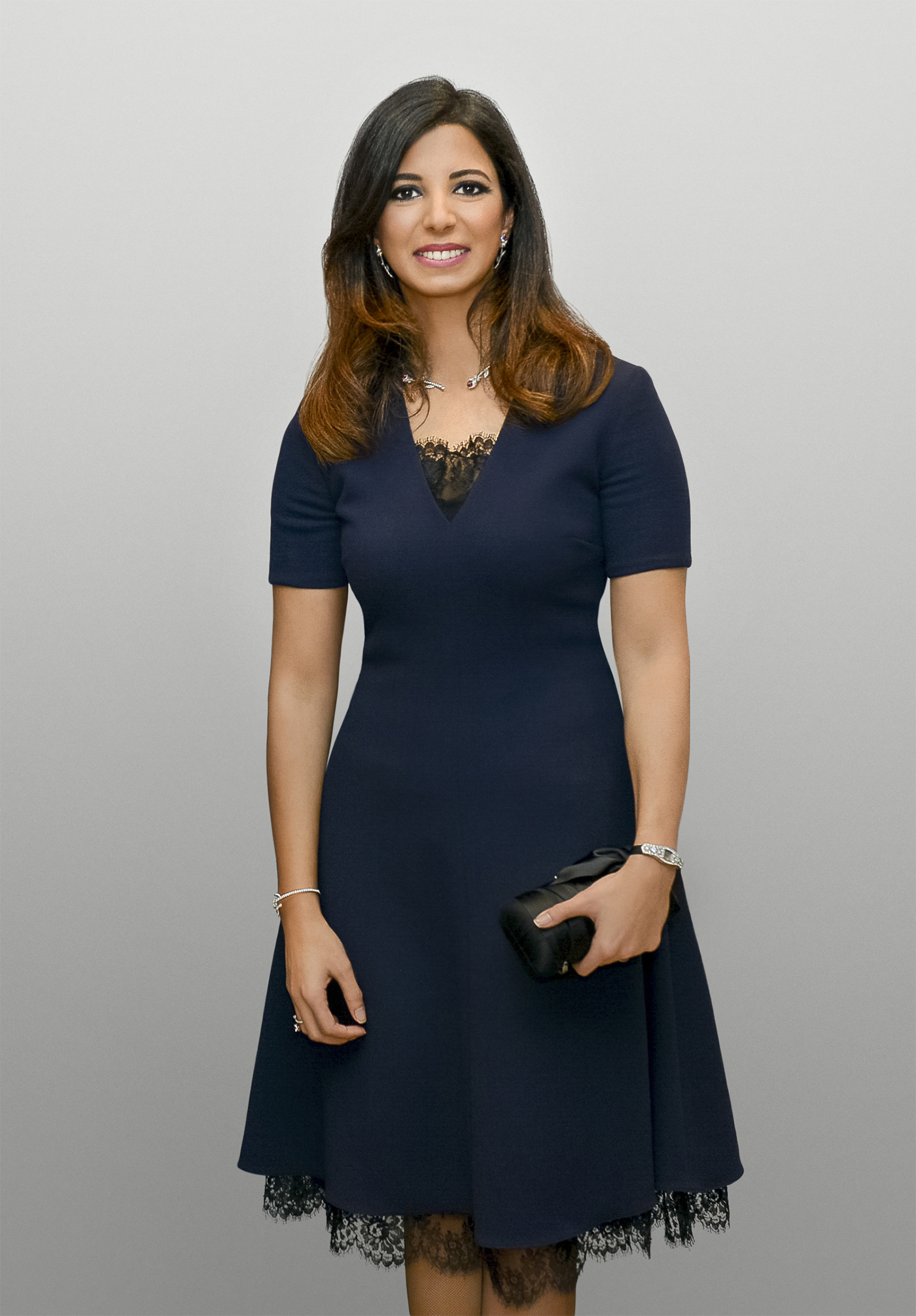 Hind Hariri photographiée par Gil Zetbase au Yacht club de Monaco 2017